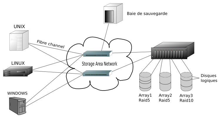 Schéma classique d'une architecture SAN (Storage Area Network).